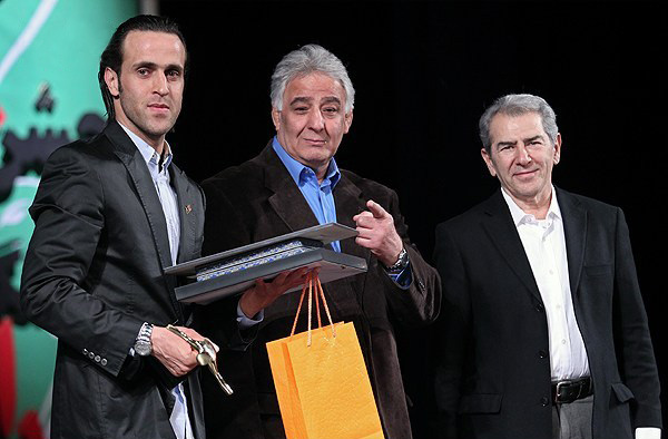 علی کریمی، محمدرضا طالقانی و فرامرز قریبیان - جشن دوازدهمین سالگرد باشگاه ورزشی هنرمندان ایران / اسفند ۱۳۹۲